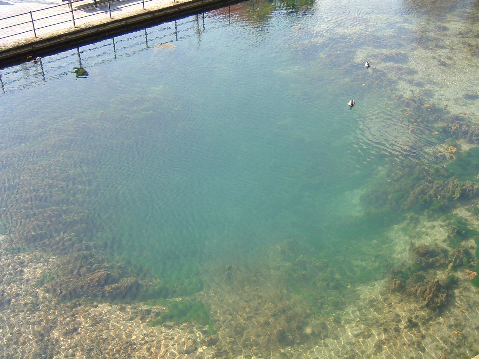 Odins Auge, das markannte Merkmal des Karstquelltopfs der Lippe bei Bad Lippspringe in Nordrhein-Westfalen, Deutschland.